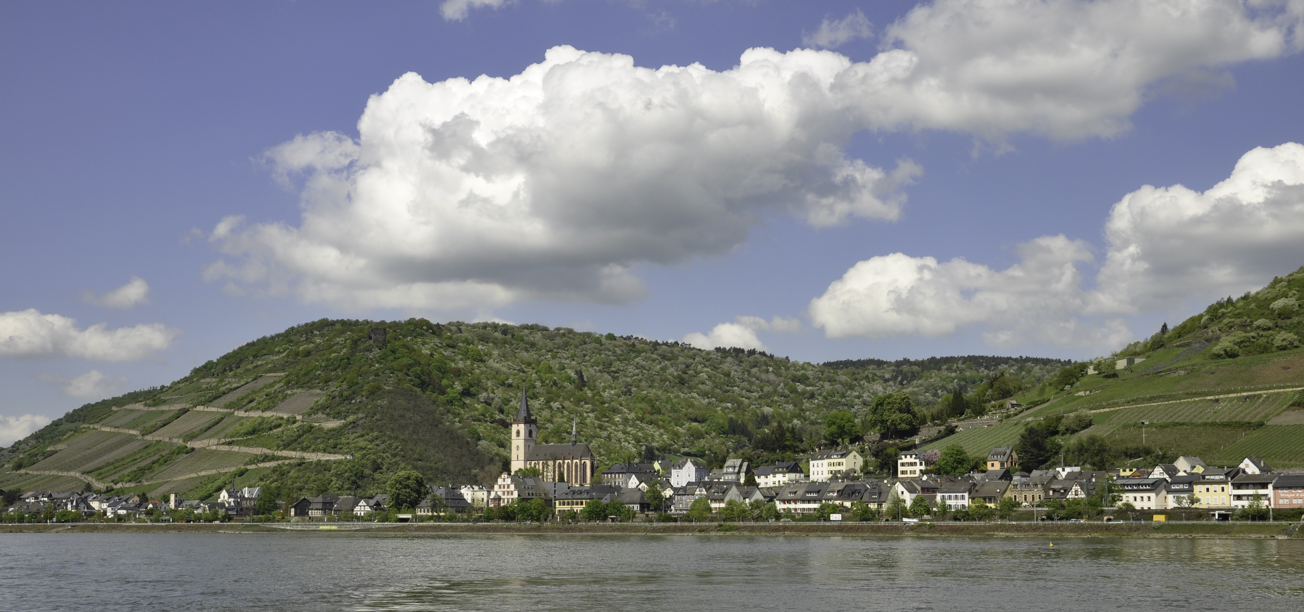 Lorch am Rhein vom Fluß aus gesehen